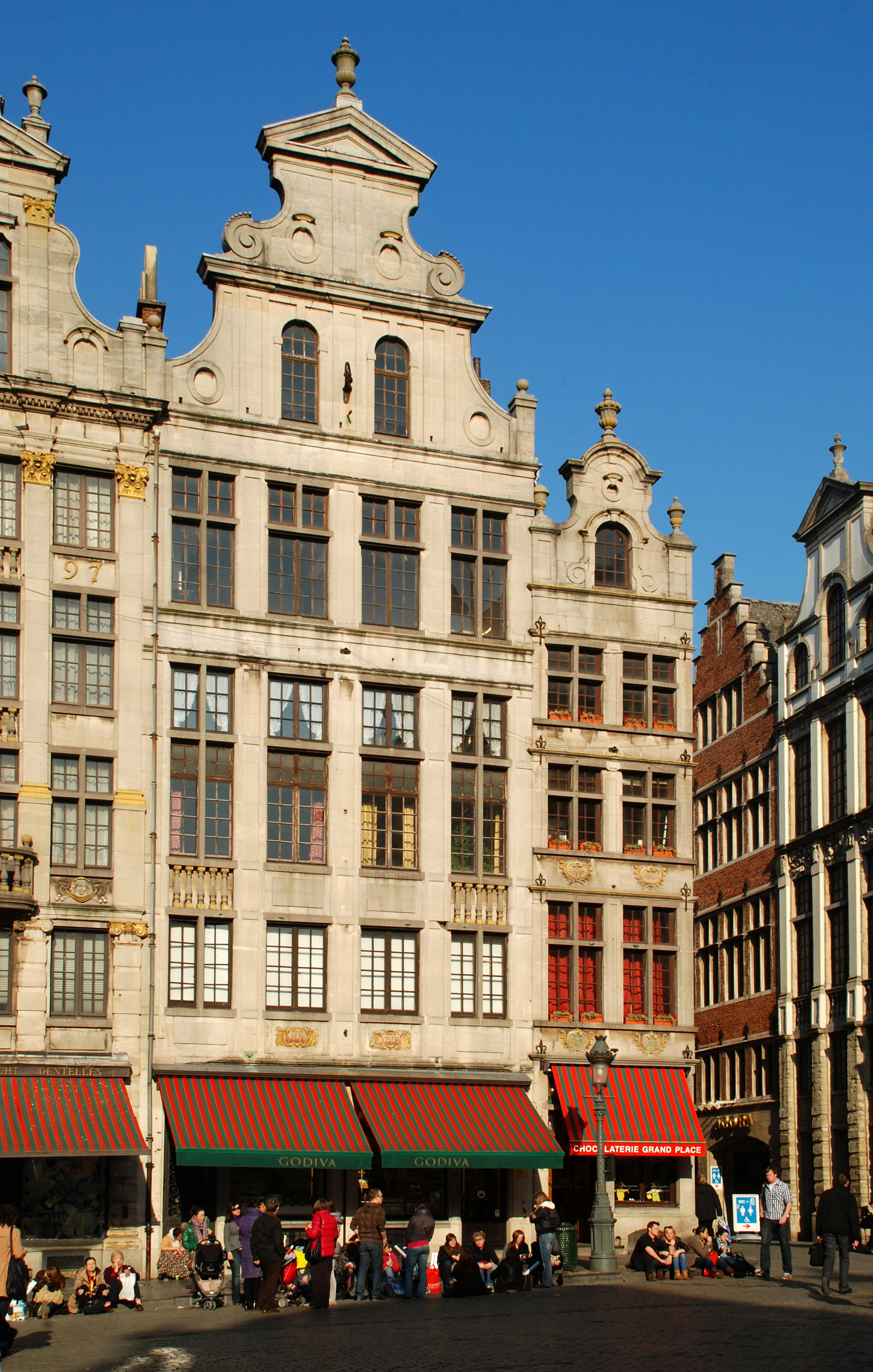 Belgique - Bruxelles - Grand-Place - Maison de Joseph et Anne